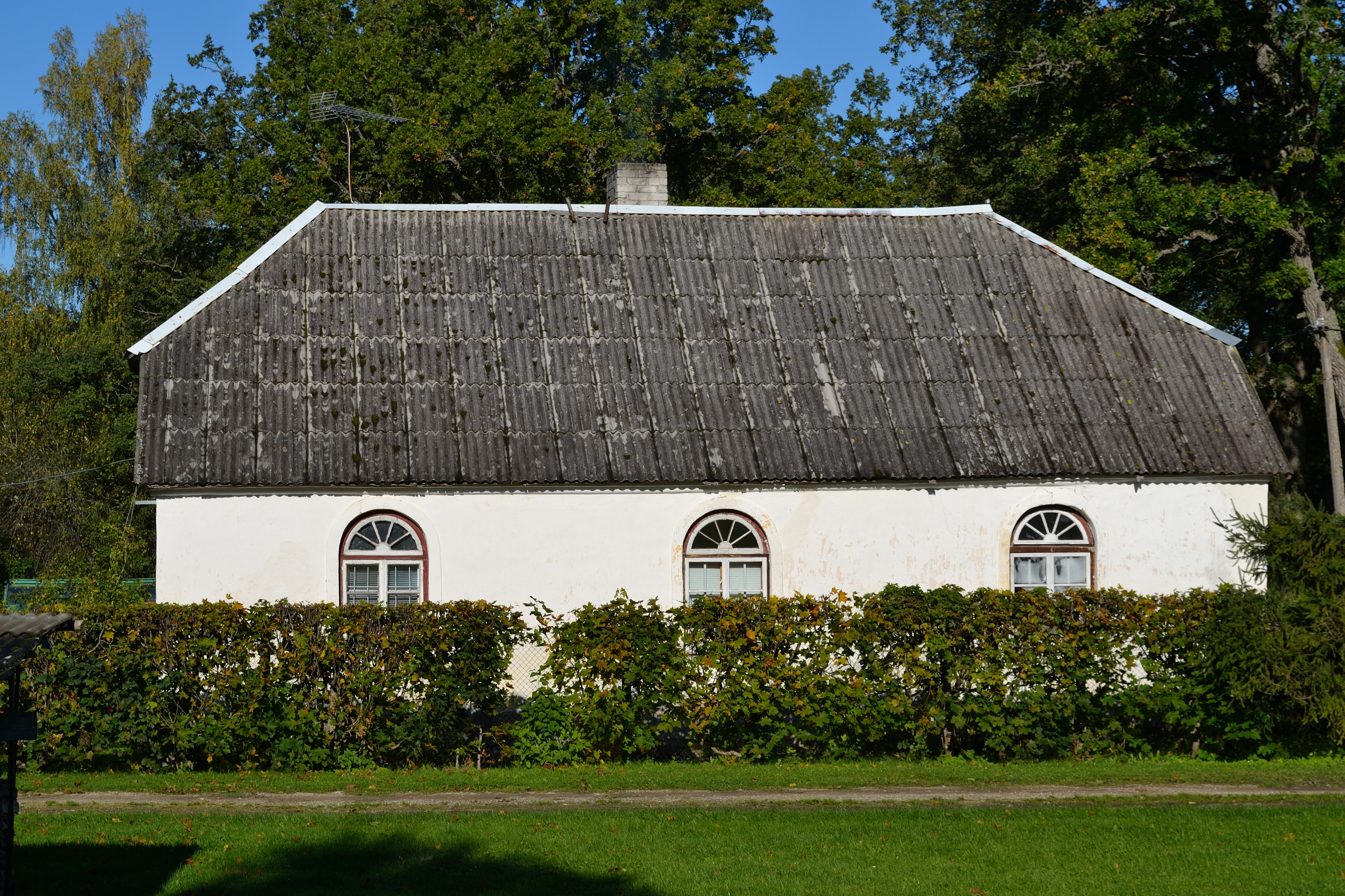 Seli mõisa aednikumaja